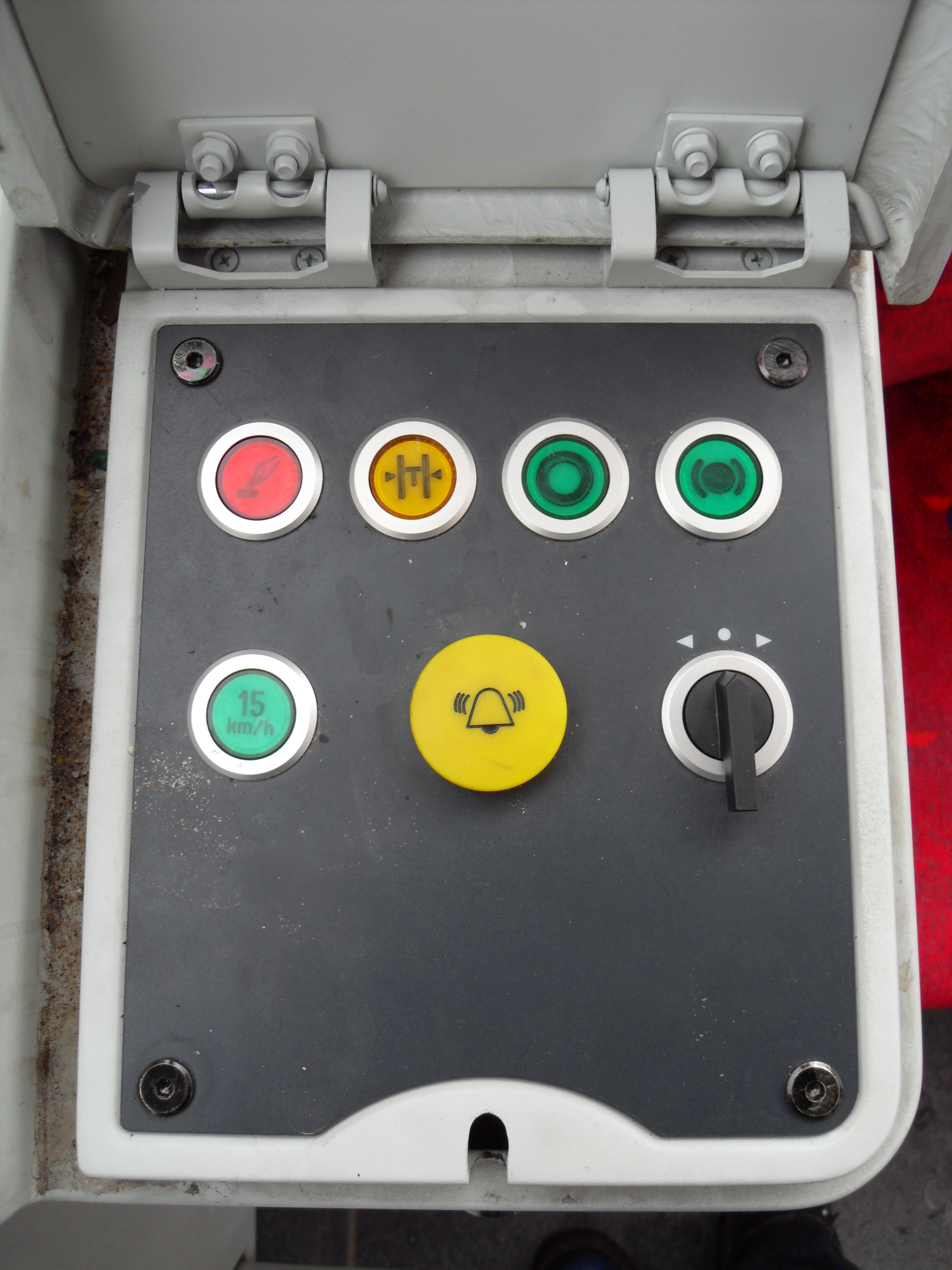 Gdańsk. PESA 120Na, panel sterowania jazdą do tyłu.